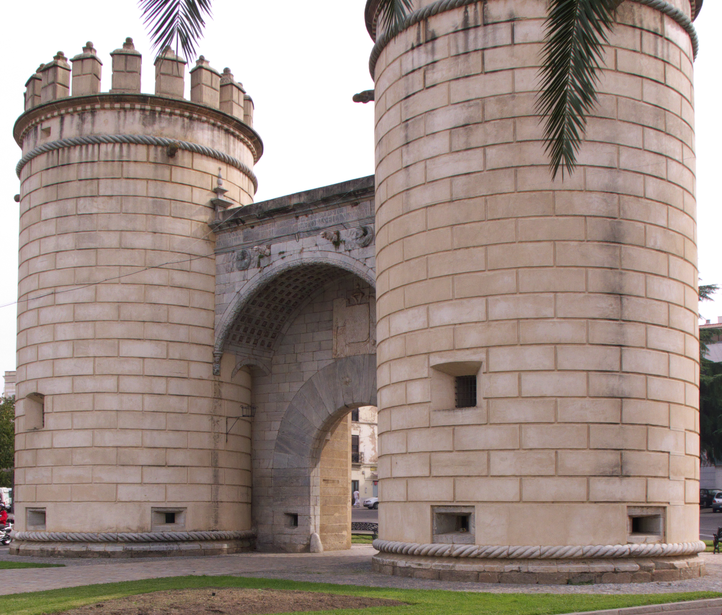 Una de las puertas de la ciudad (1551)